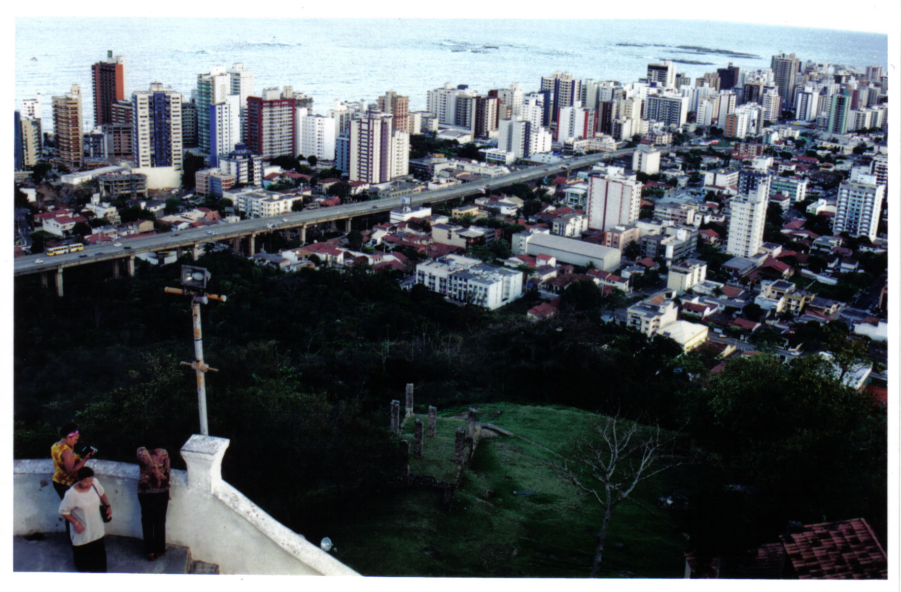 Parte da Terceira Ponte e Praia da Costa vistos a partir do Convento da Penha. Vila Velha, Espírito Santo, Brasil. Foto: Fernando Abreu